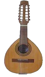 Bandurria (eigen foto)